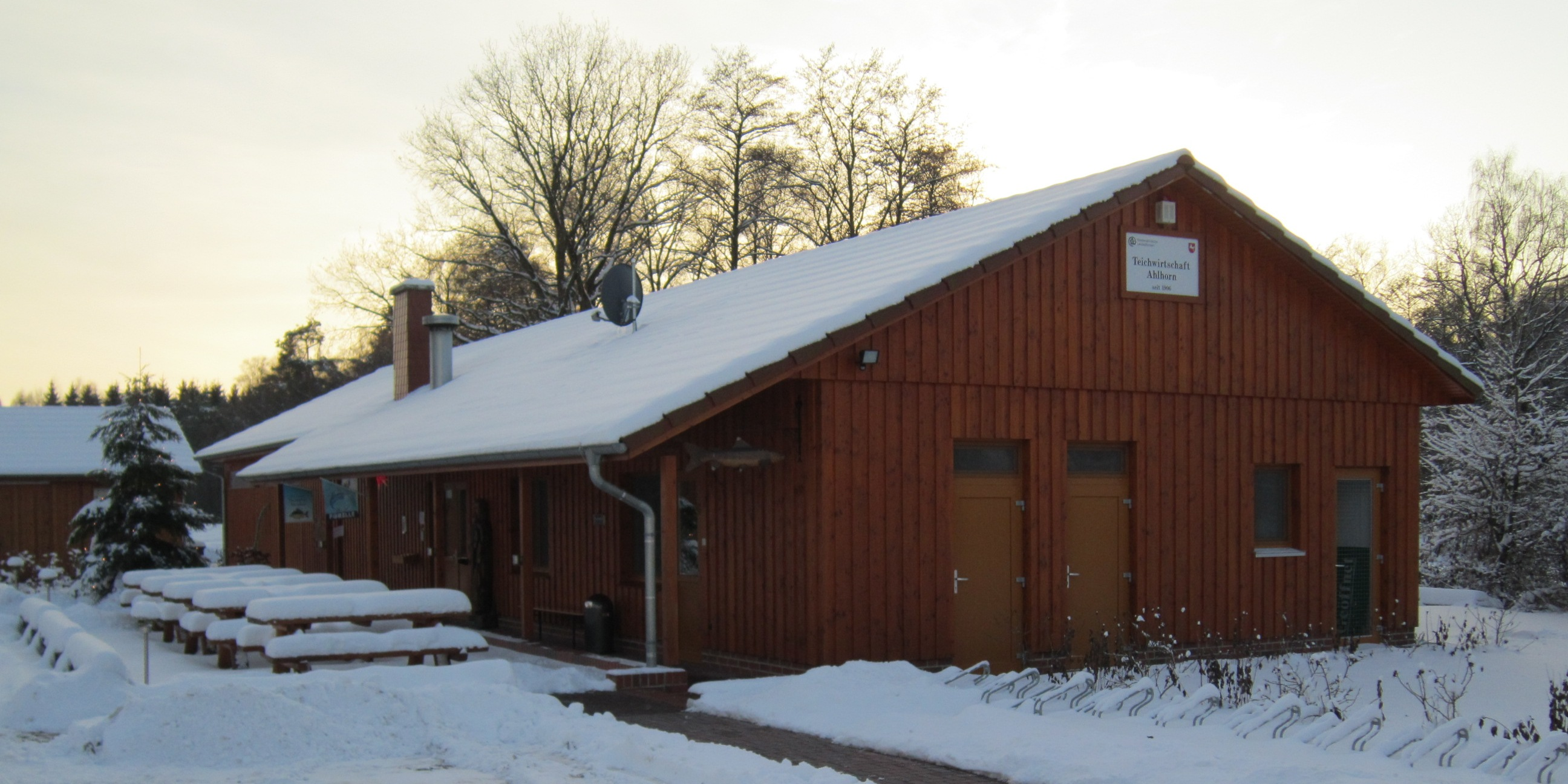 Fischverkaufsstelle der Staatlichen Teichwirtschaft Ahlhorn